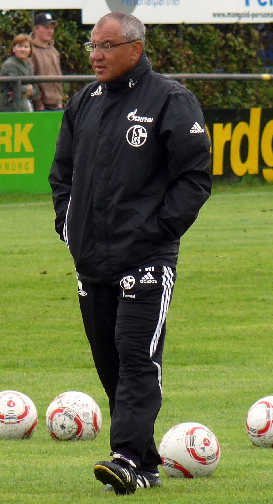 Felix Magath während des Trainings, 2010